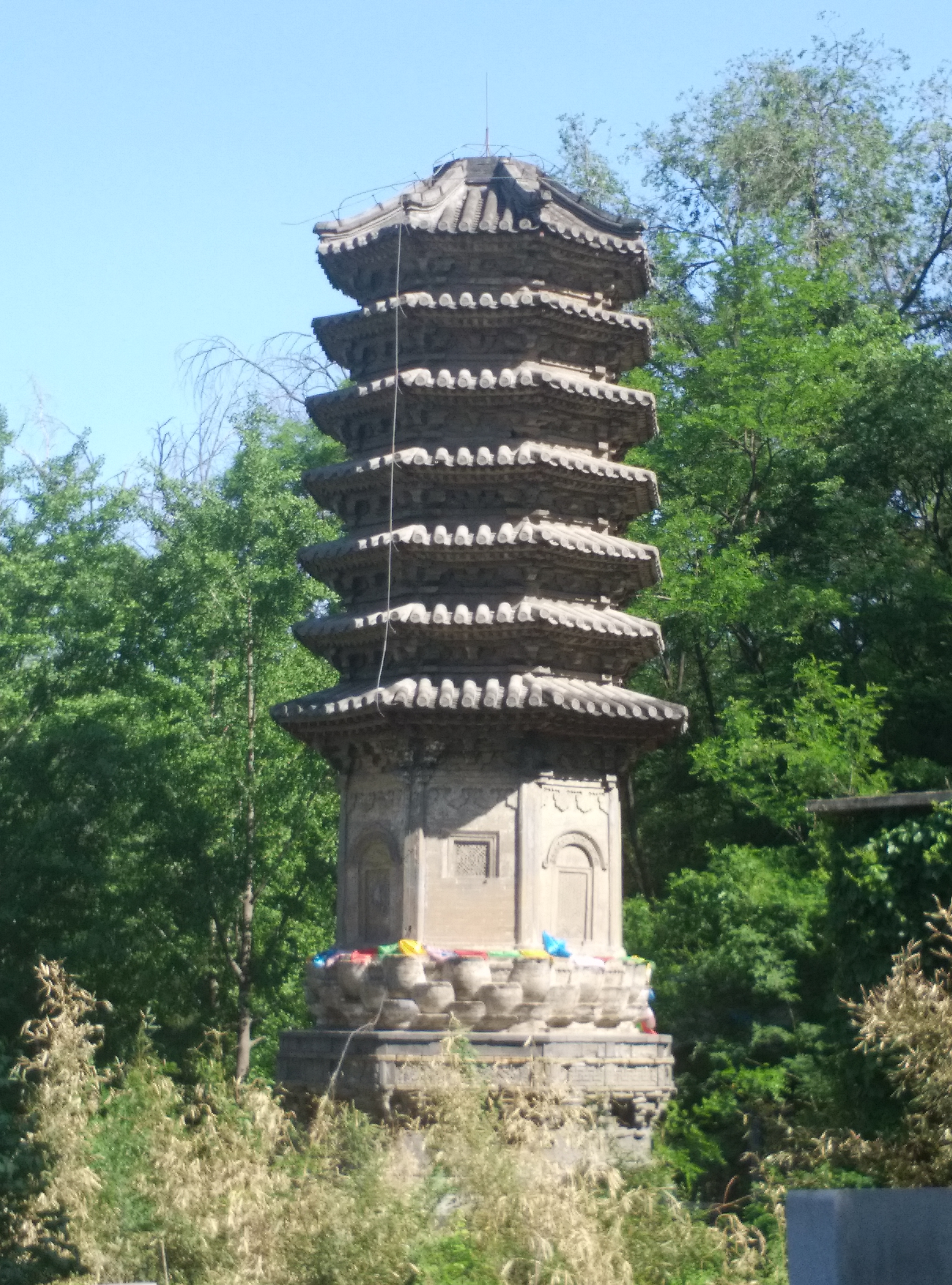 万佛堂文保碑东侧的密檐式塔